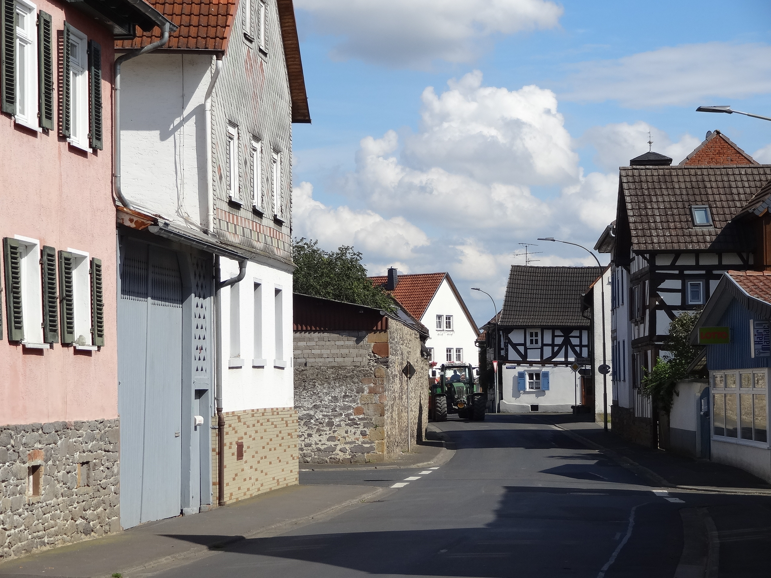 Gesamtanlage historischer Ortskern (Bellersheim)